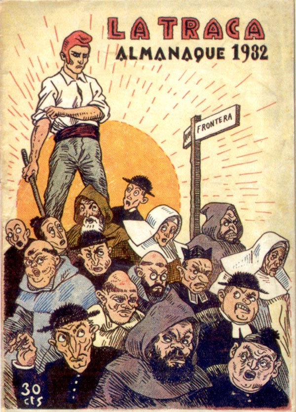 Almanac de La Traca